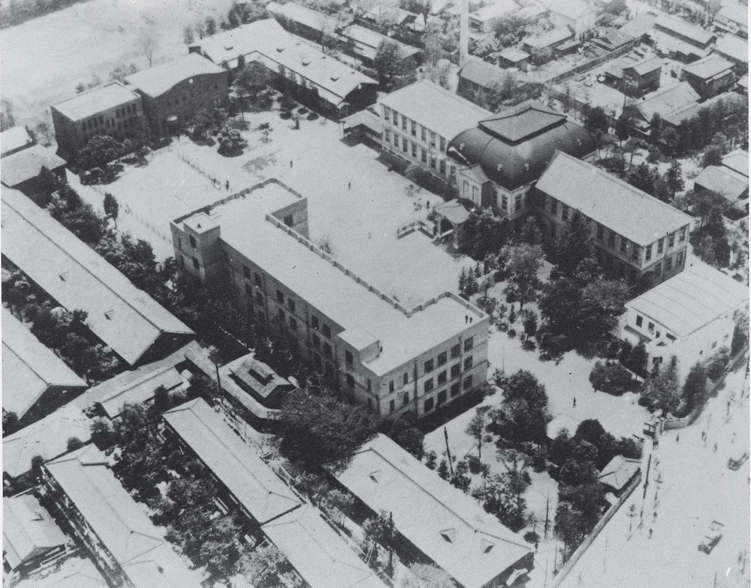 大正大学全景